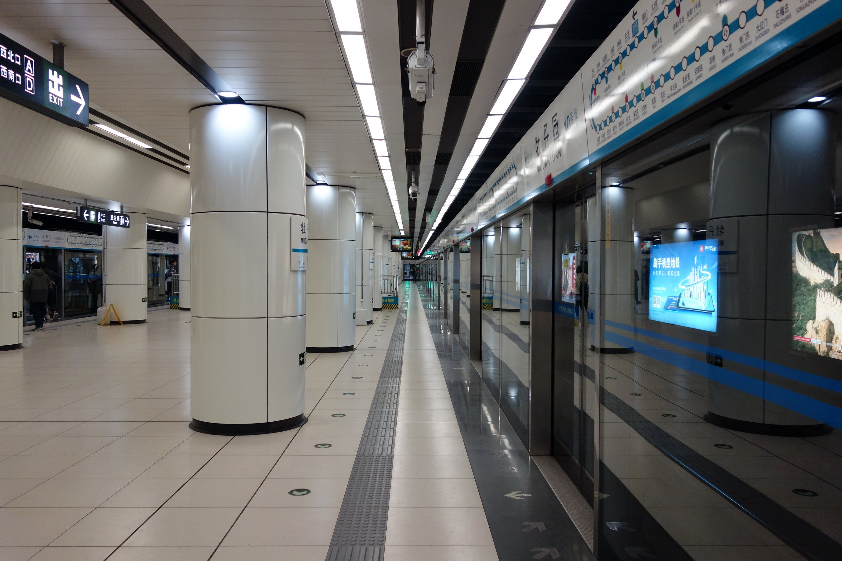 北京地铁10号线牡丹园站站台